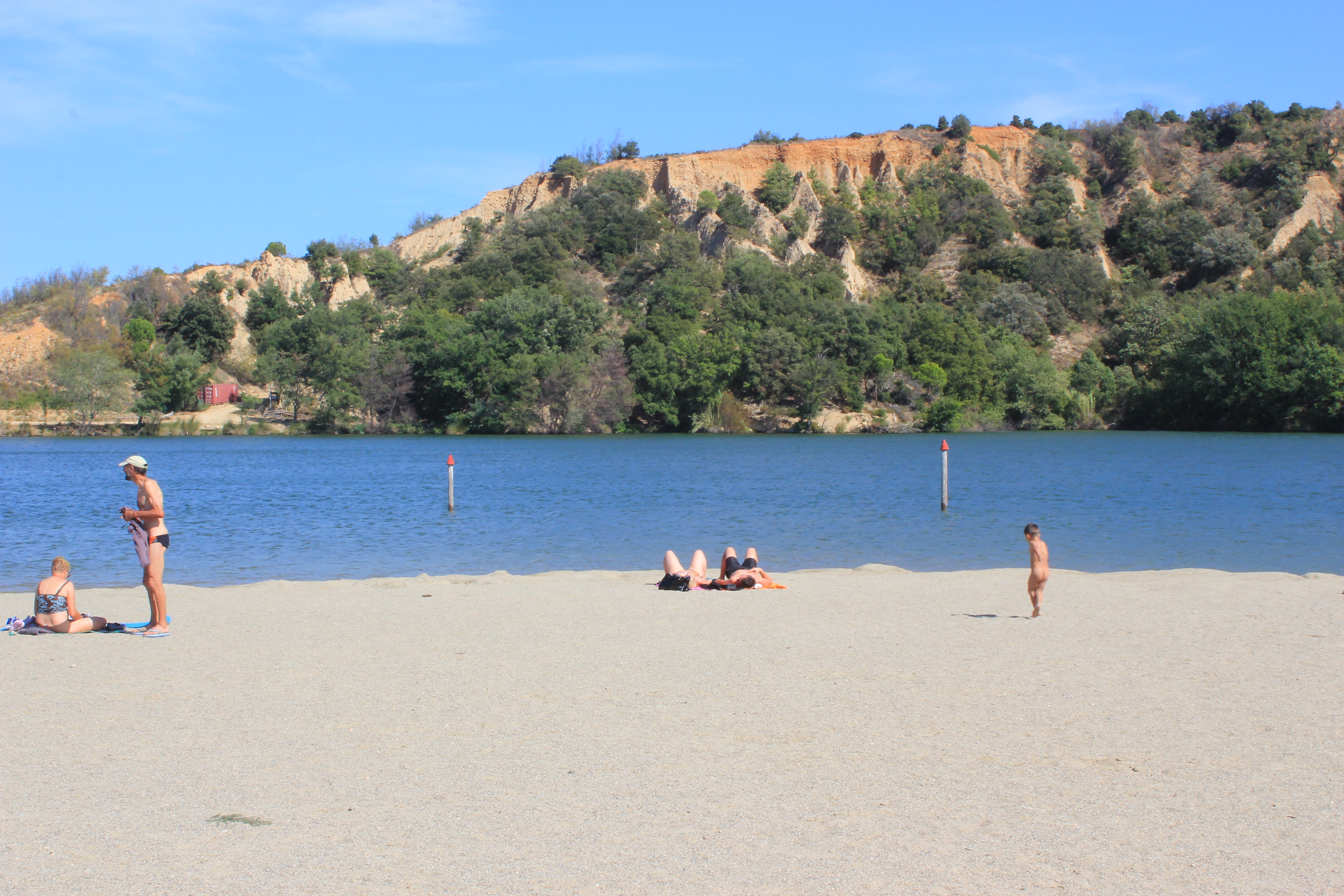 Vinça (66320 France) La plage